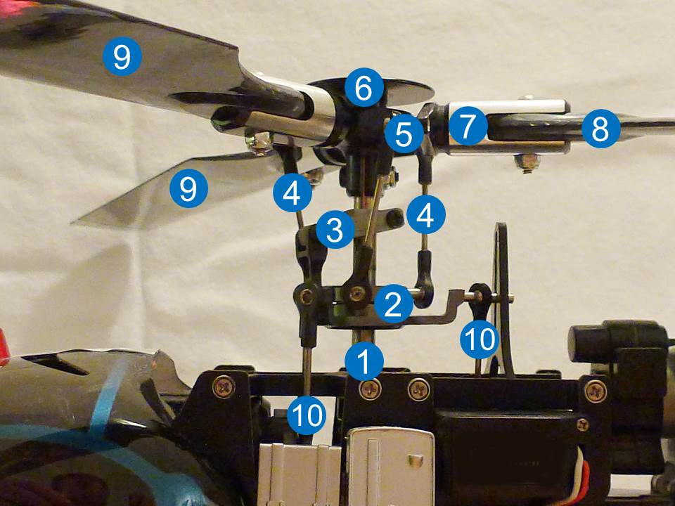 Hauptrotor eines Modellhubschraubers mit Legende